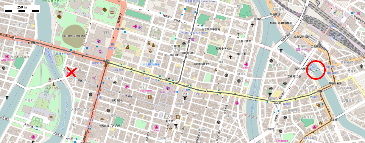 2016年の広島市地図に猿猴橋と爆心地を示したもの This map may be incomplete, and may contain errors. Don't rely solely on it for navigation.